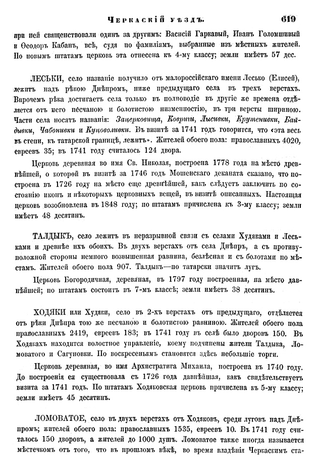 Страница 619